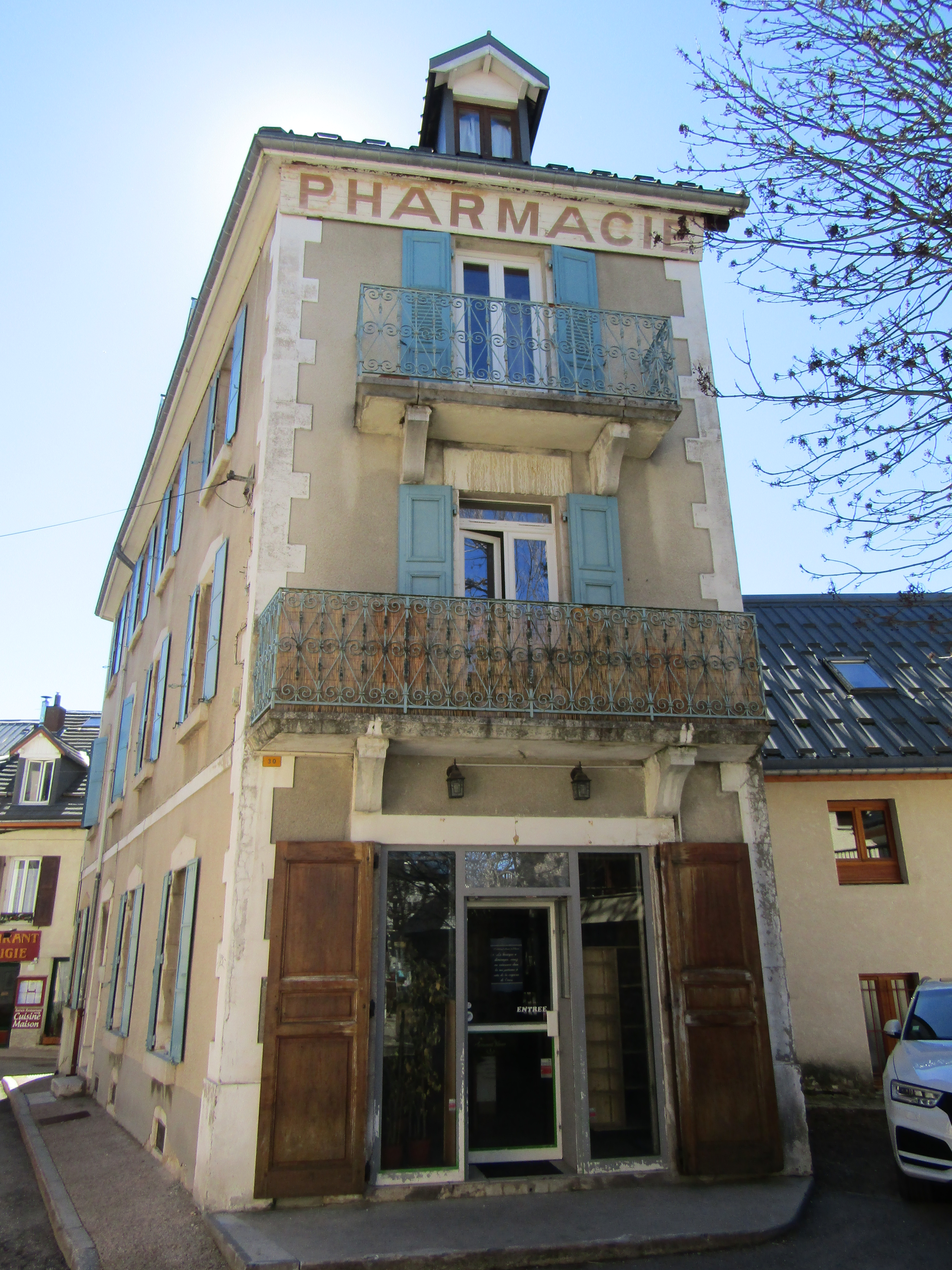 Immeuble de l'ancienne pharmacie de Villard-de-Lans (1930's) en mars 2019